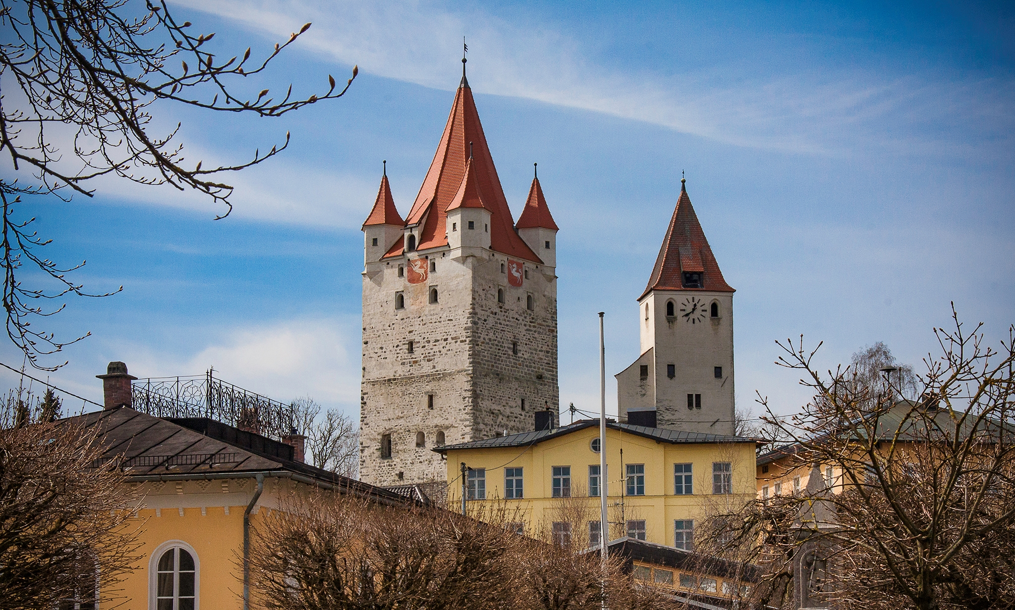 Schloss Haag, östliche Ansicht